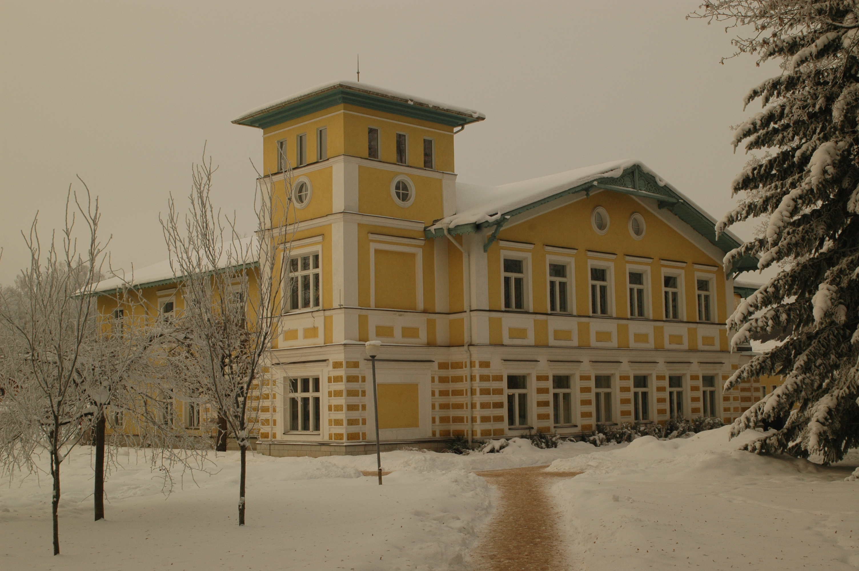 Valga KRK talvel